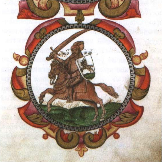 Беларуская (тарашкевіца): Герб Полацкага княства (Połacak) з Пагоняй (Pahonia), з Маскоўскага Тытулярніка 1672 году